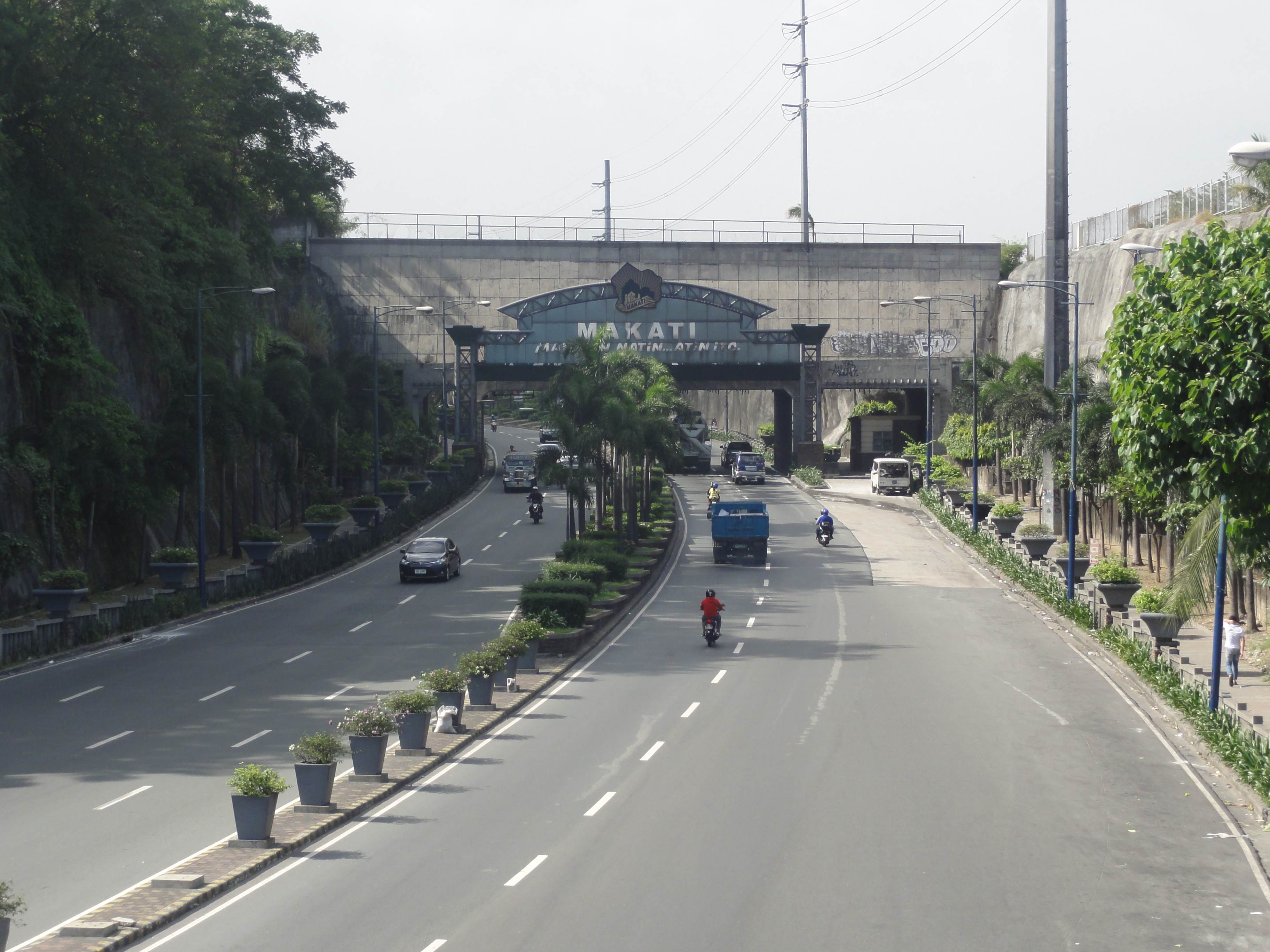 Makati sign at Kalayaan Avenue, Fort Bonifacio, Makati